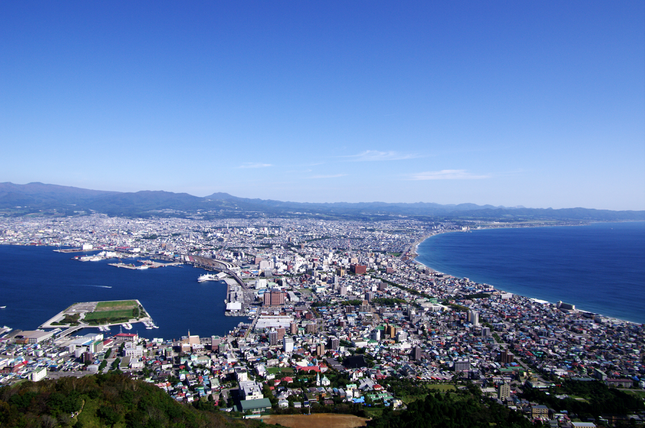 函館山からの眺望